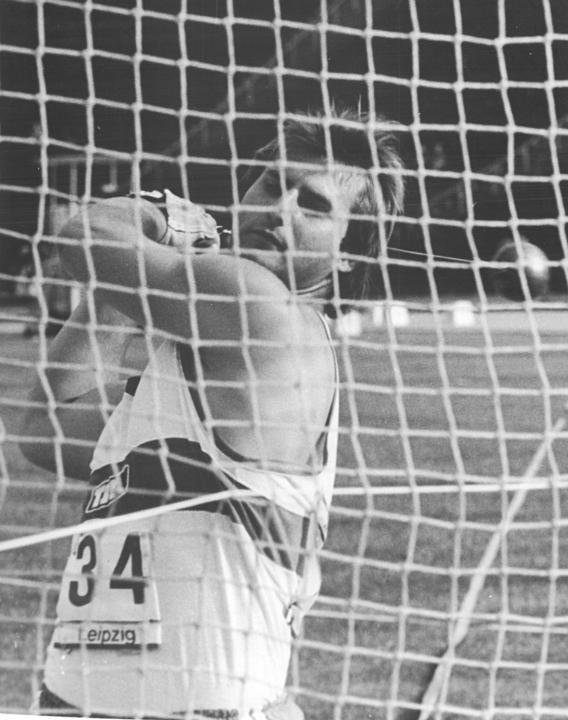 Roland Steuk ADN-ZB Kluge 01.07.1978-str-Leipzig: DDR-Meisterschaften der Leichtathleten-Mit einem neuen DDR-Rekord begann der erste Tag der Titelkämpfe. Der 19jährige TSC-Sportler aus Berlin Roland Steuk wurde DDR-Meister mit der Rekordweite von 78,14 m, die gleichzeitig Junioren-Weltbestleistung bedeuten.